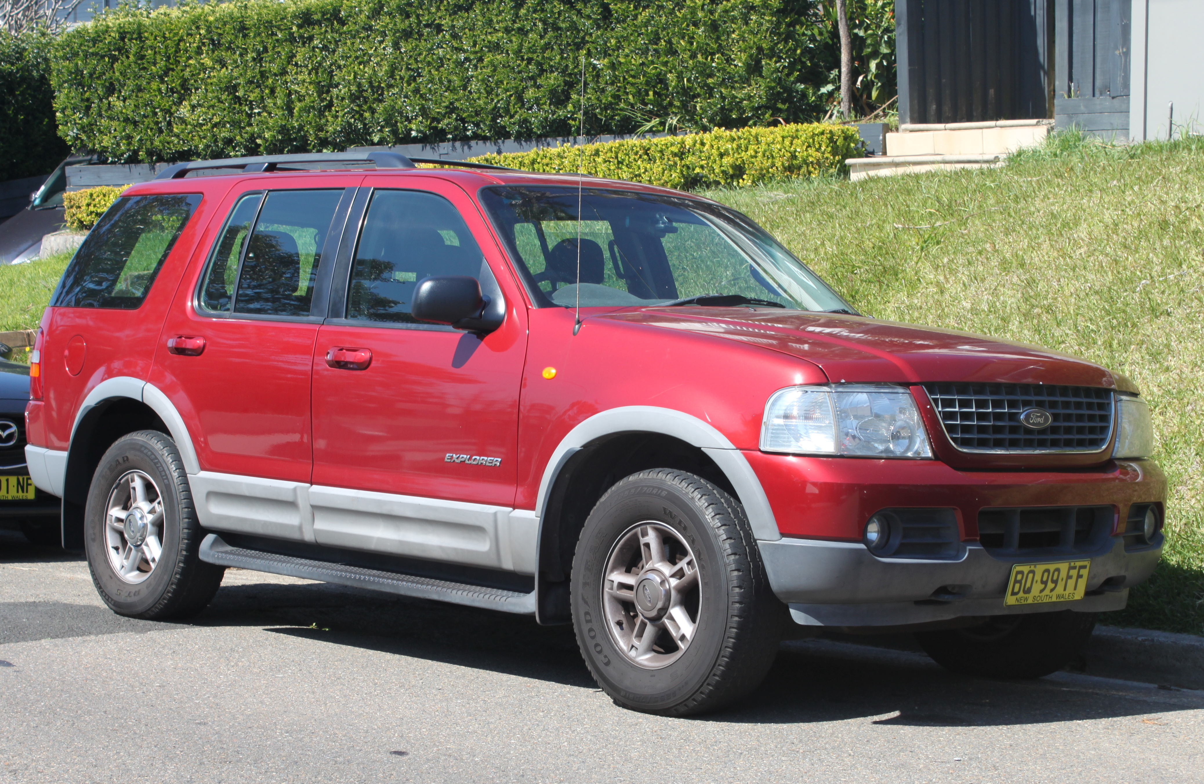 Ford Explorer UT XLT